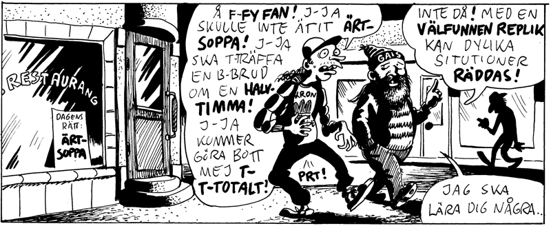 Skrubbefar, en av seriefigurerna i Ett anstötligt liv.